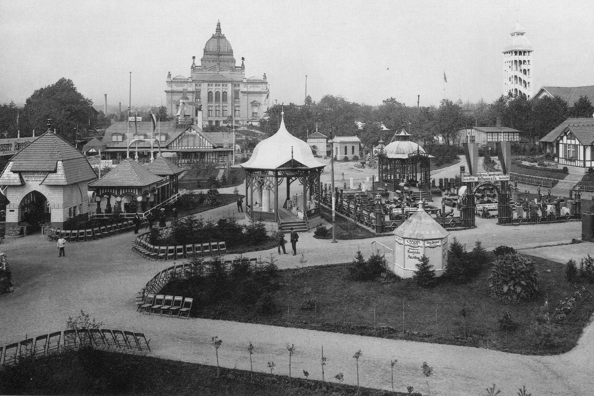 Industrie- und Gewerbeausstellung 1905 in Görlitz, im Hintergrund die Oberlausitzer Ruhmeshalle